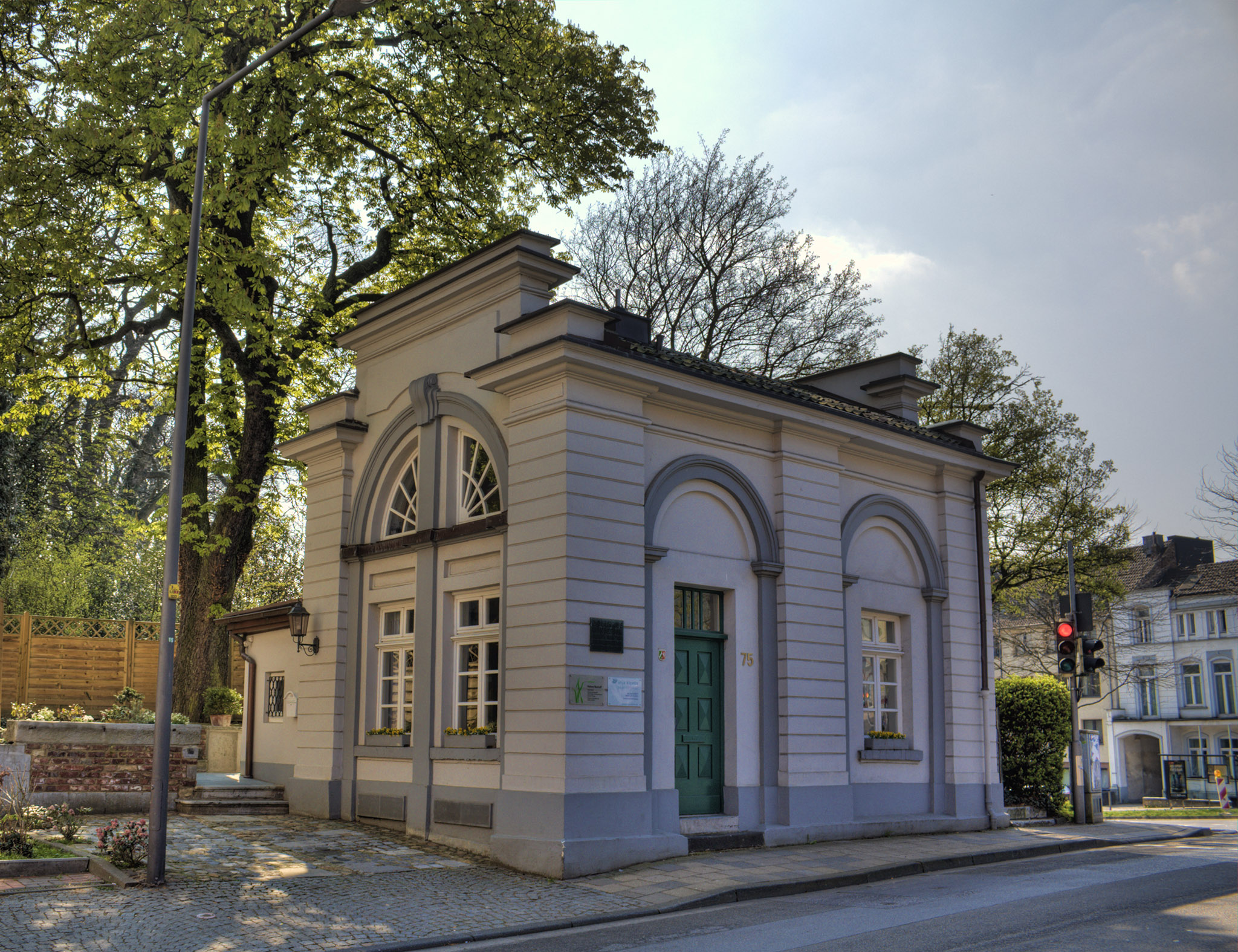 Aachen, Königstraße 75: ehemaliges Zoll- und Wachhäuschen am Königstor, 1836 erbaut von Adam Franz Friedrich Leydel; heute WohnhausThis is a photograph of an architectural monument., no. 0